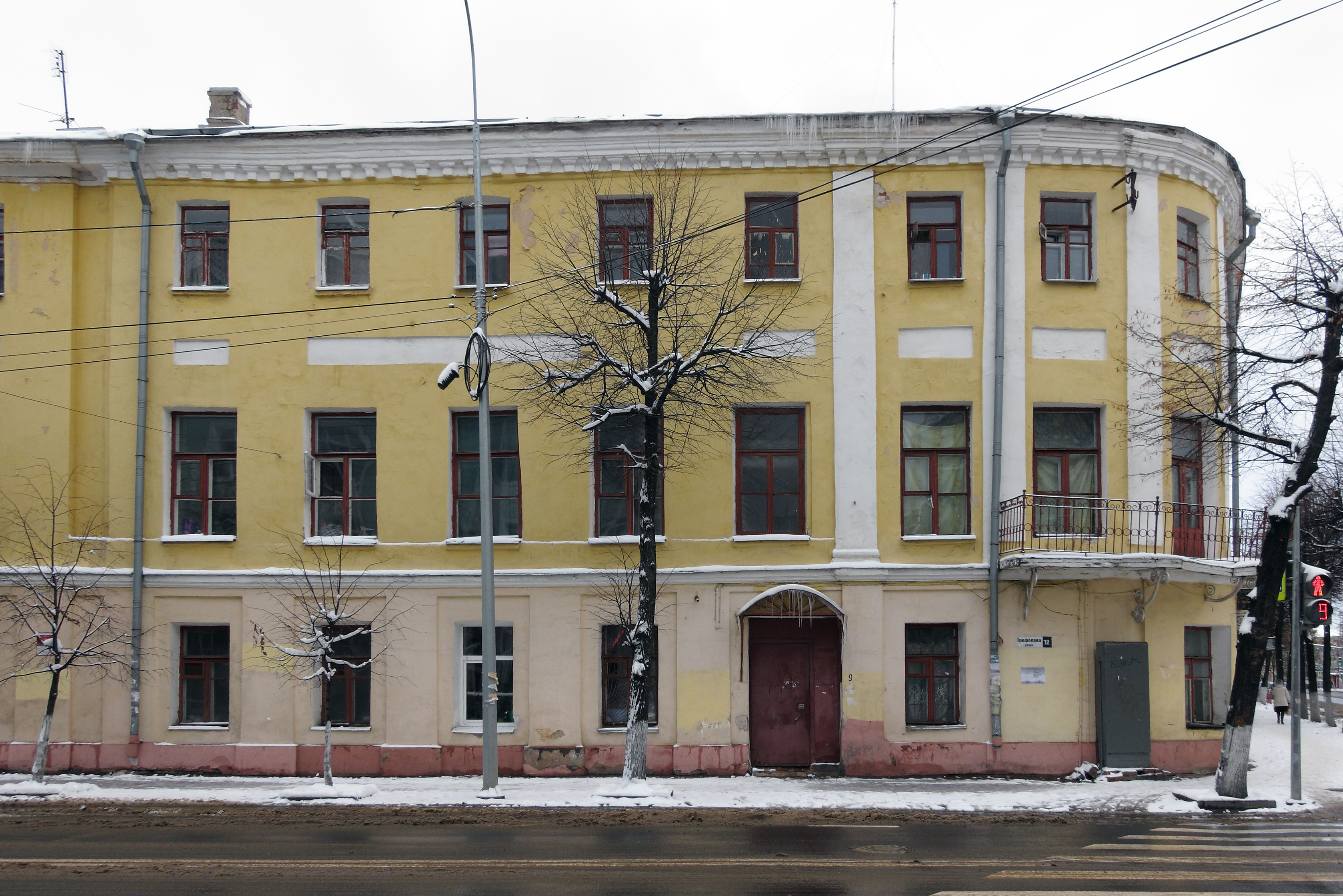 Дом жилой (Ярославская область, Ярославль, Трефолева улица, 12)